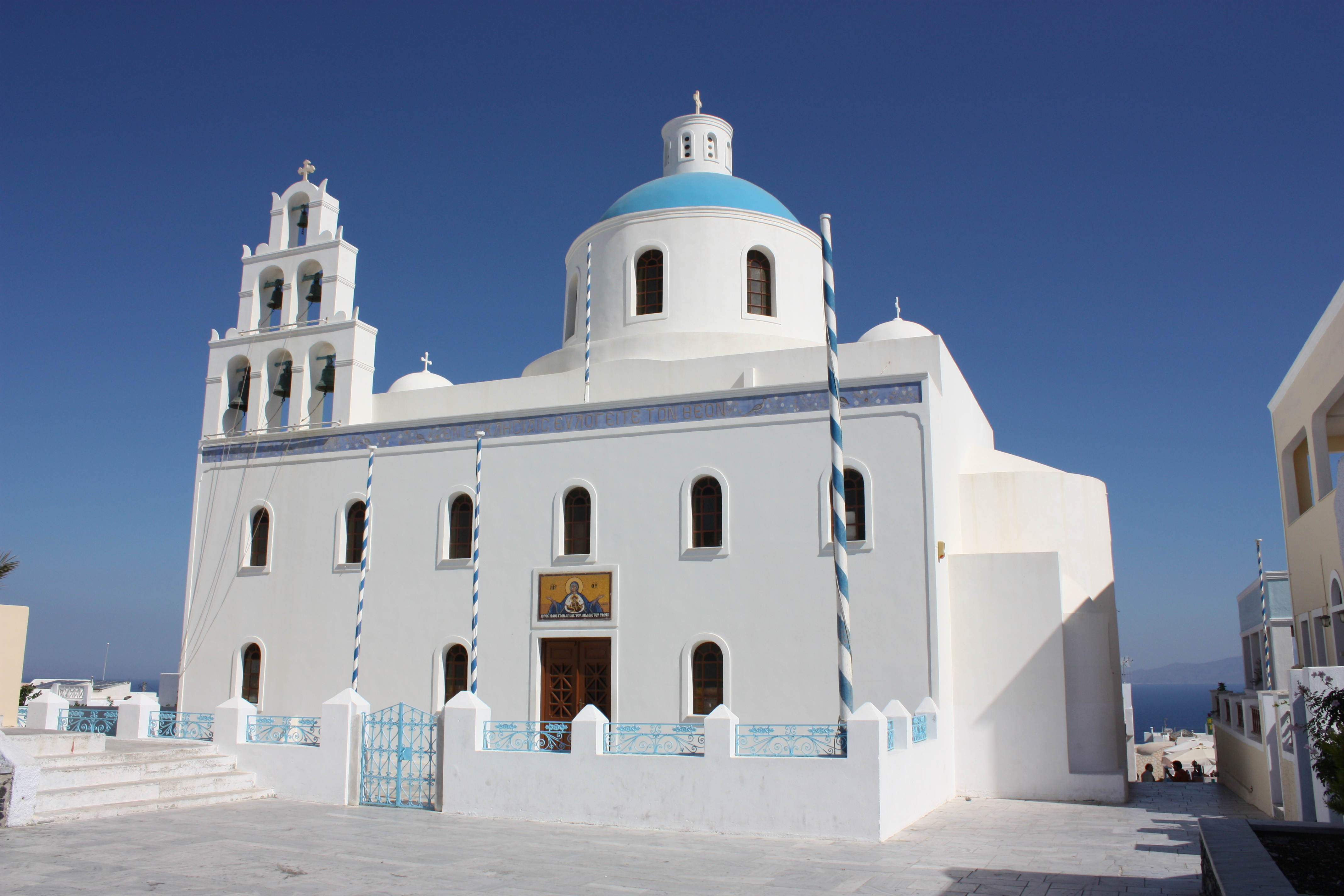 Santorini, Oia